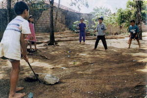 Permainan Sunda